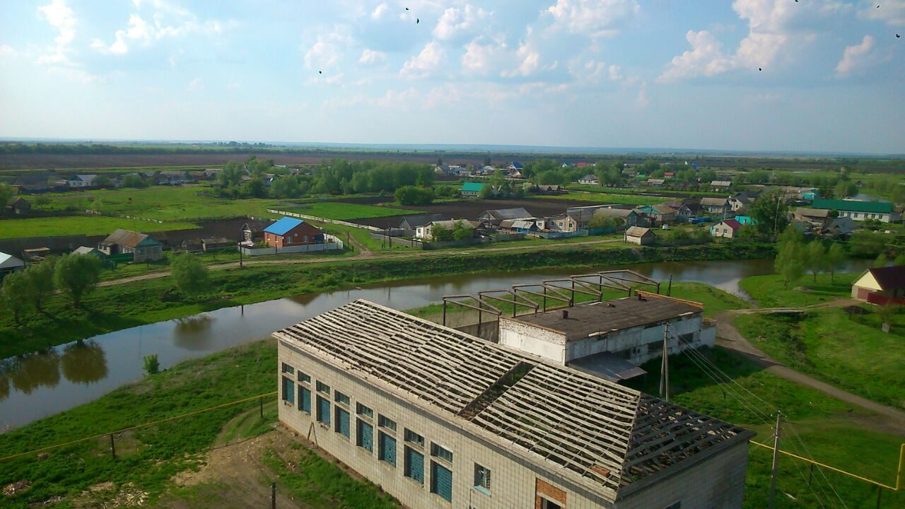 Спортзал в Аксумле